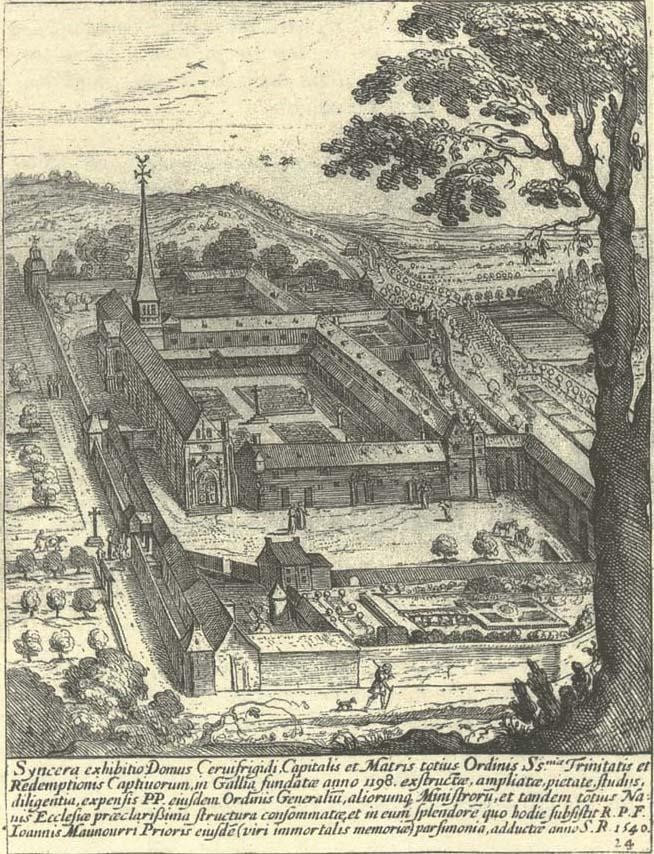 Eis como se apresentava em 1540 o convento de Cerfroid (França) segundo uma incisão de 1633.